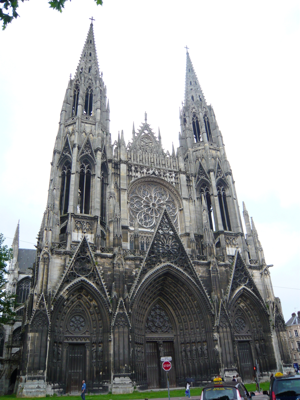 Abbatiale Saint Ouen de Rouen, vu avant de l'édifice.